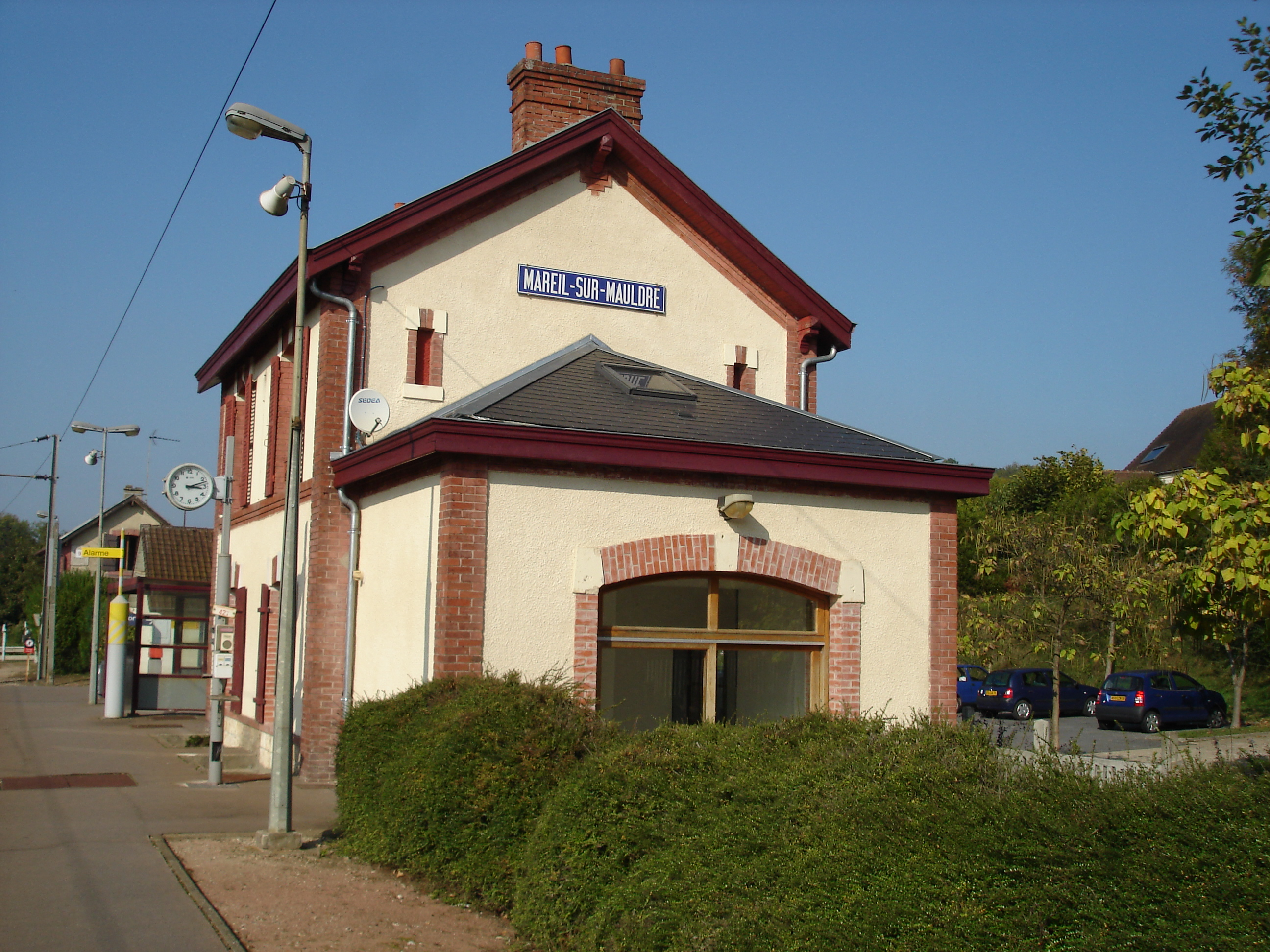 Gare de Mareil-sur-Mauldre (78) : Le bâtiment voyageurs.